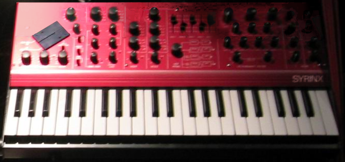 Synton Syrinx [1]